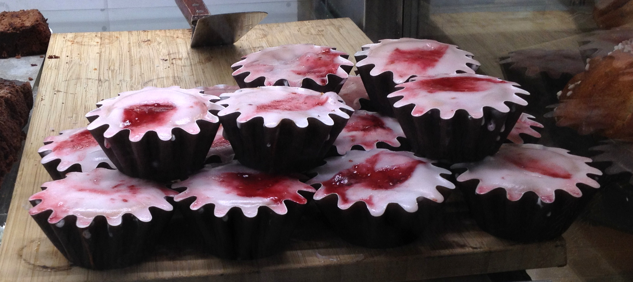 Ett antal av bakverket katalaner.